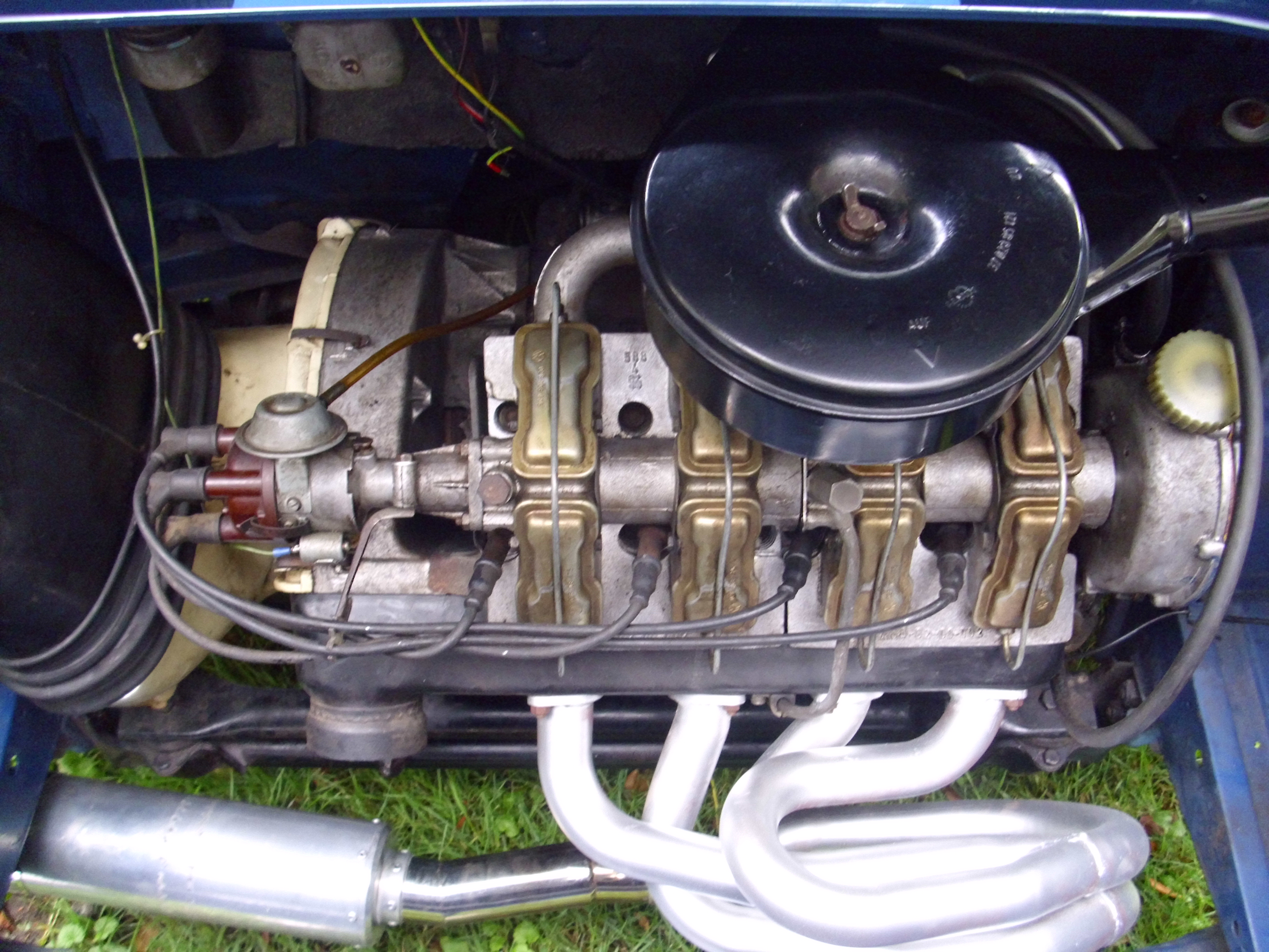 Motor eines NSU Prinz 1000 Bauj. 1964 beim Oldtimertreffen auf dem Gelände des Speichenmuseum in Klein Offenseth-Sparrieshoop